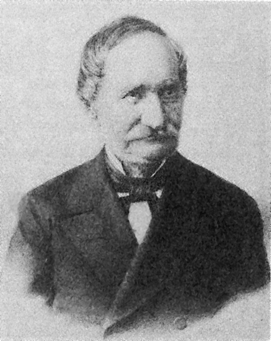 Wilhelm Schulz (1806-1888), Braunschweigischer Staatsminister (1876-1883) Wilhelm Schulz (1806-1888), Minister of State of the Duchy of Brunswick (1876-1883)